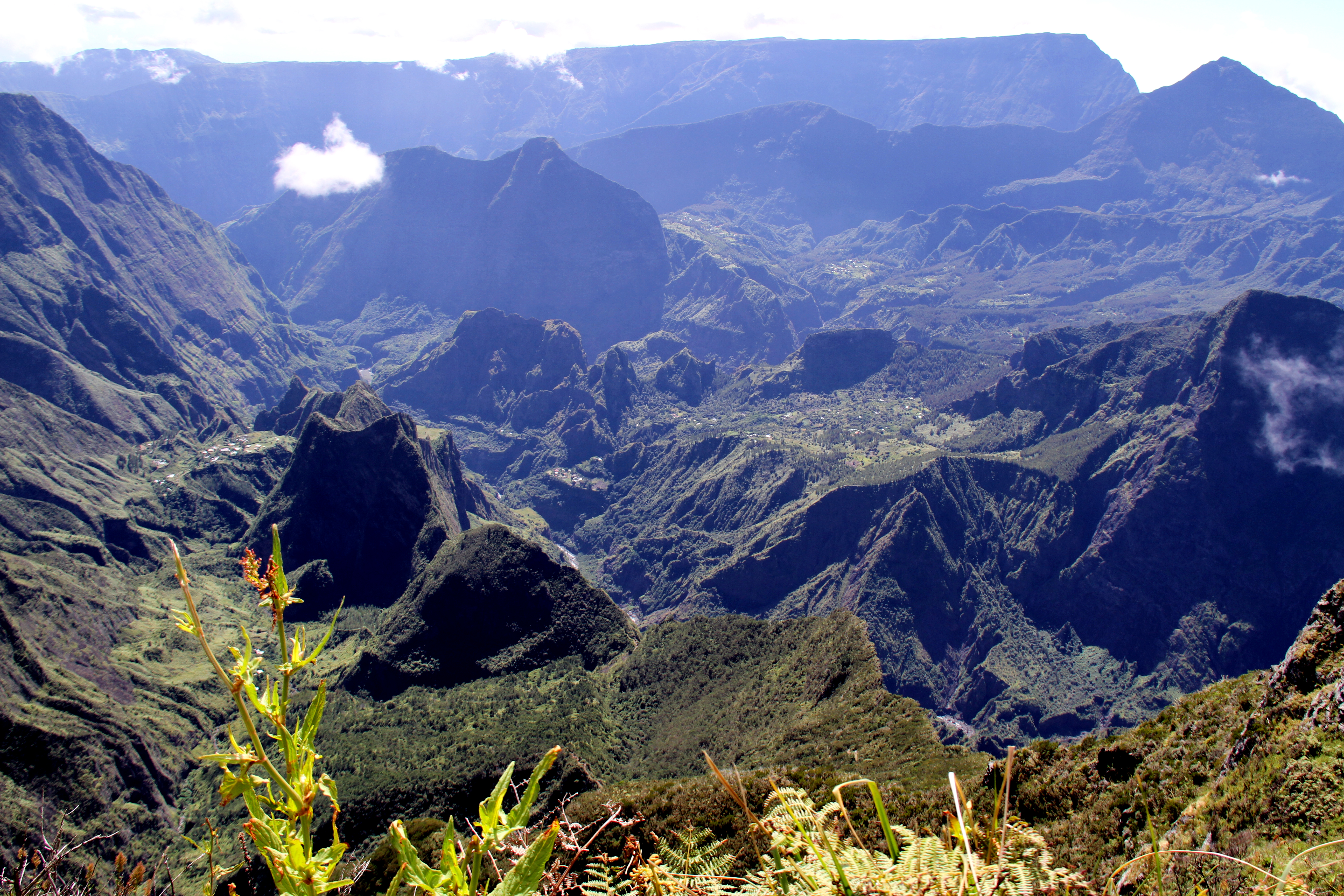 la réunion; le cirque de Mafate